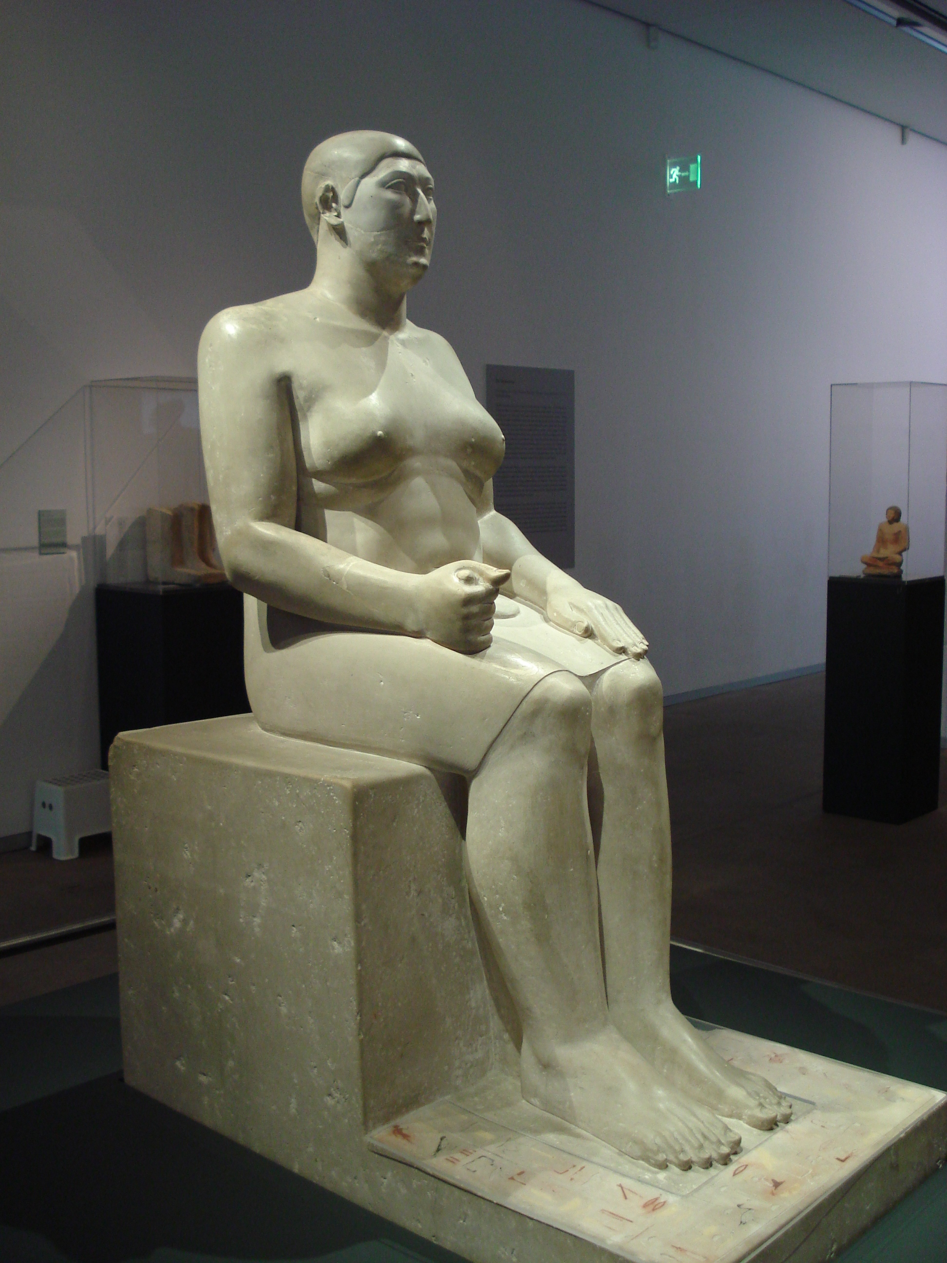 Hemiunu szobra (Roemer- und Pelizaeus-Museum, Hildesheim, Németország))